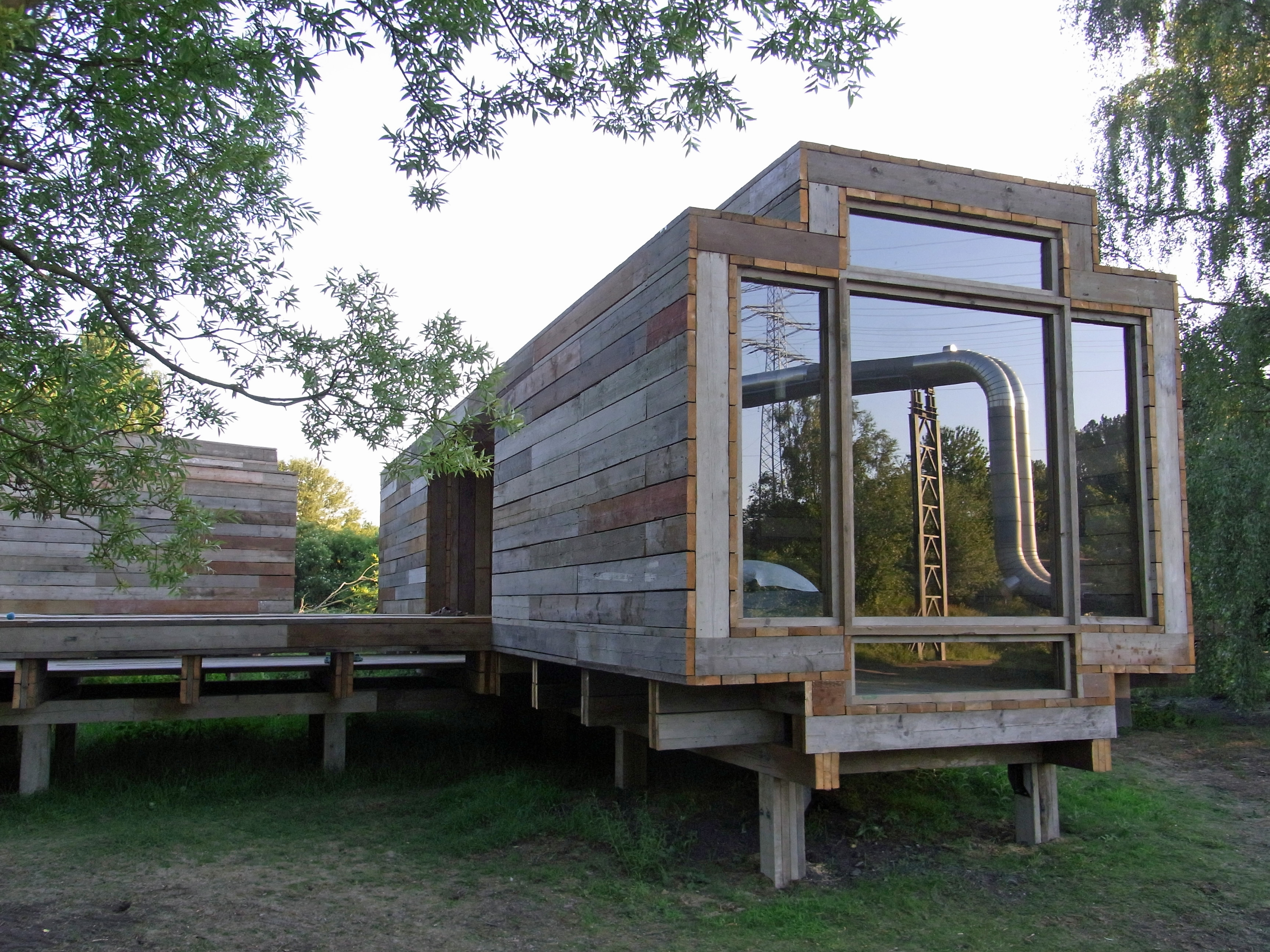 Emscherkunst.2010 Gruppe Observatorium:Geert van der Camp, Andre Dekker und Ruud Reutelingsberger: Warten auf den Fluss